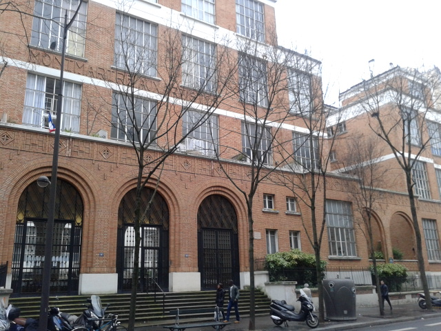 Cité Montmartre-aux-artistes (1929-1936, Adolphe Thiers architecte), 189 rue Ordener, Paris 18e. Façade et partie de l'atrium de droite.